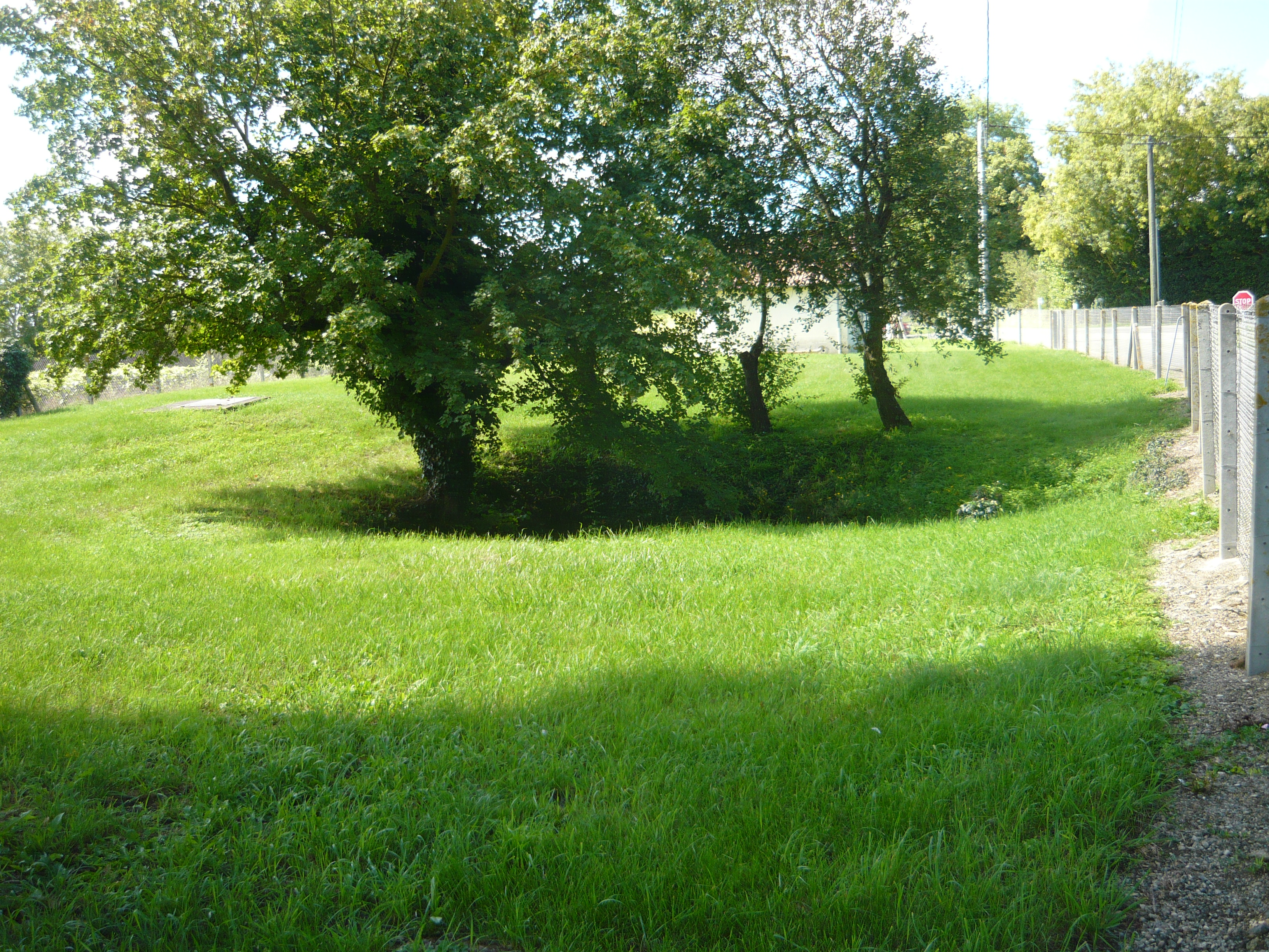 Lieu de source du Curé, petit fleuve côtier du nord de la Charente-Maritime qui naît dans le petit village éponyme de Curé dans la commune de Saint-Georges-du-Bois (17).